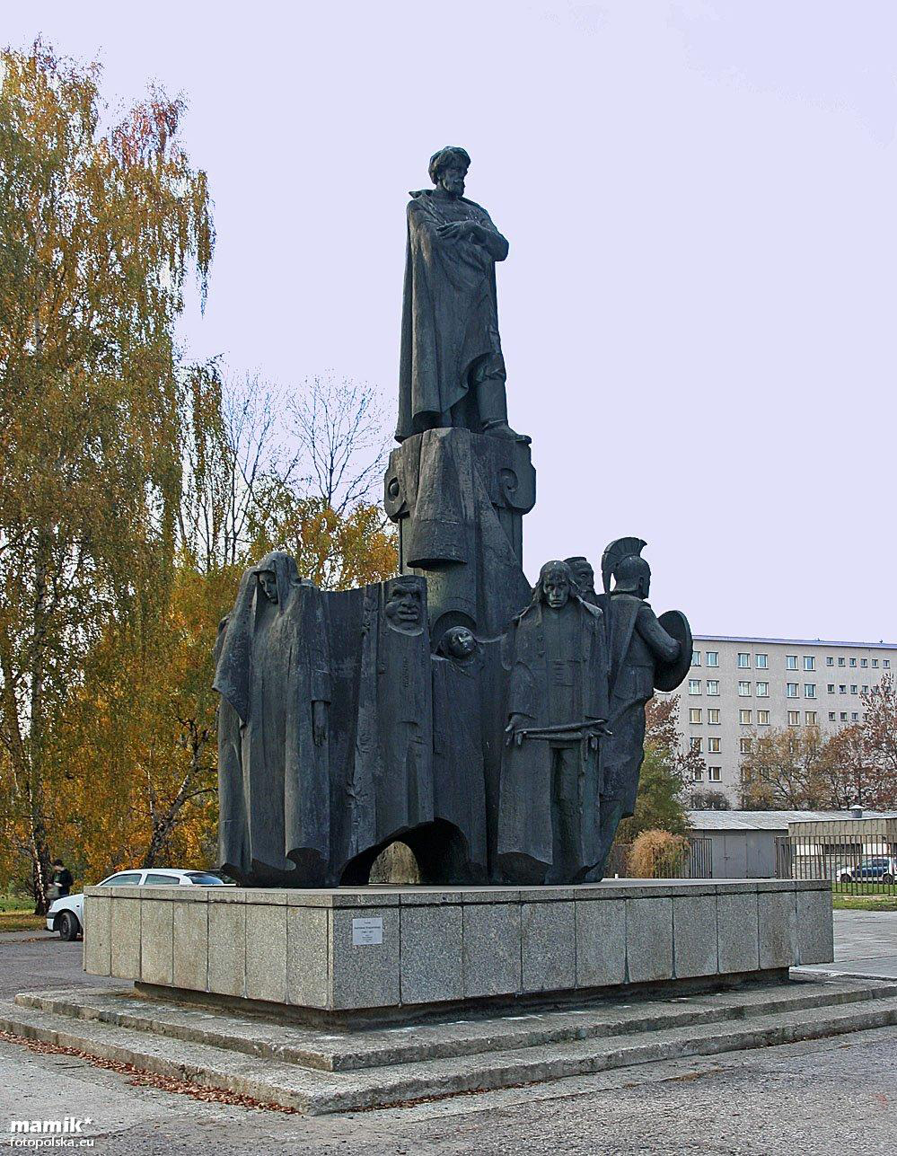 Pomnik Stanisława Wyspiańskiego przed Muzeum Narodowym